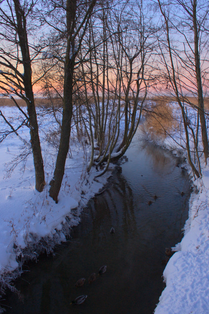 Mustjõgi Tallinnas suubumas Kopli lahte.